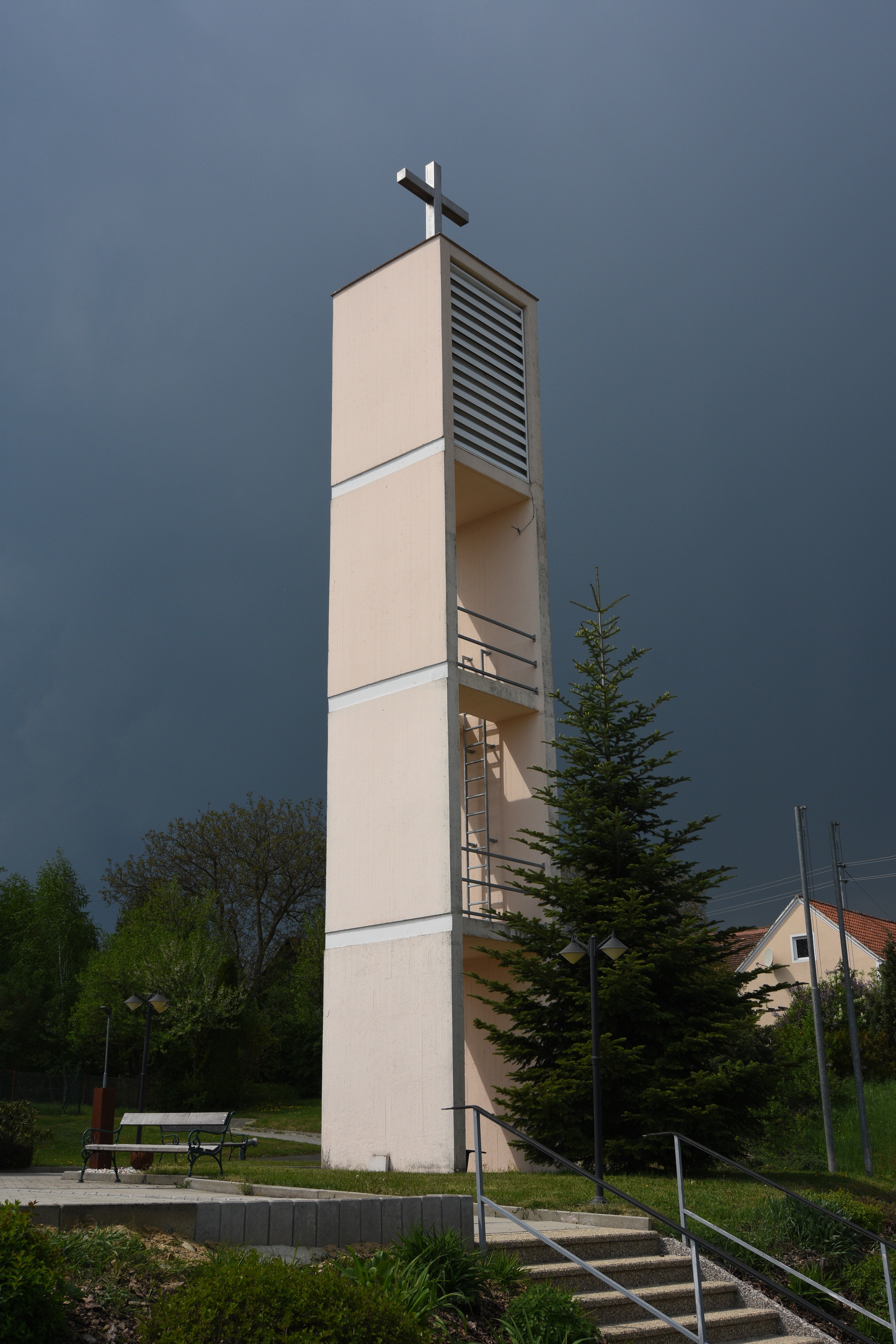 Steingraben (Gerersdorf-Sulz) Glockenturm